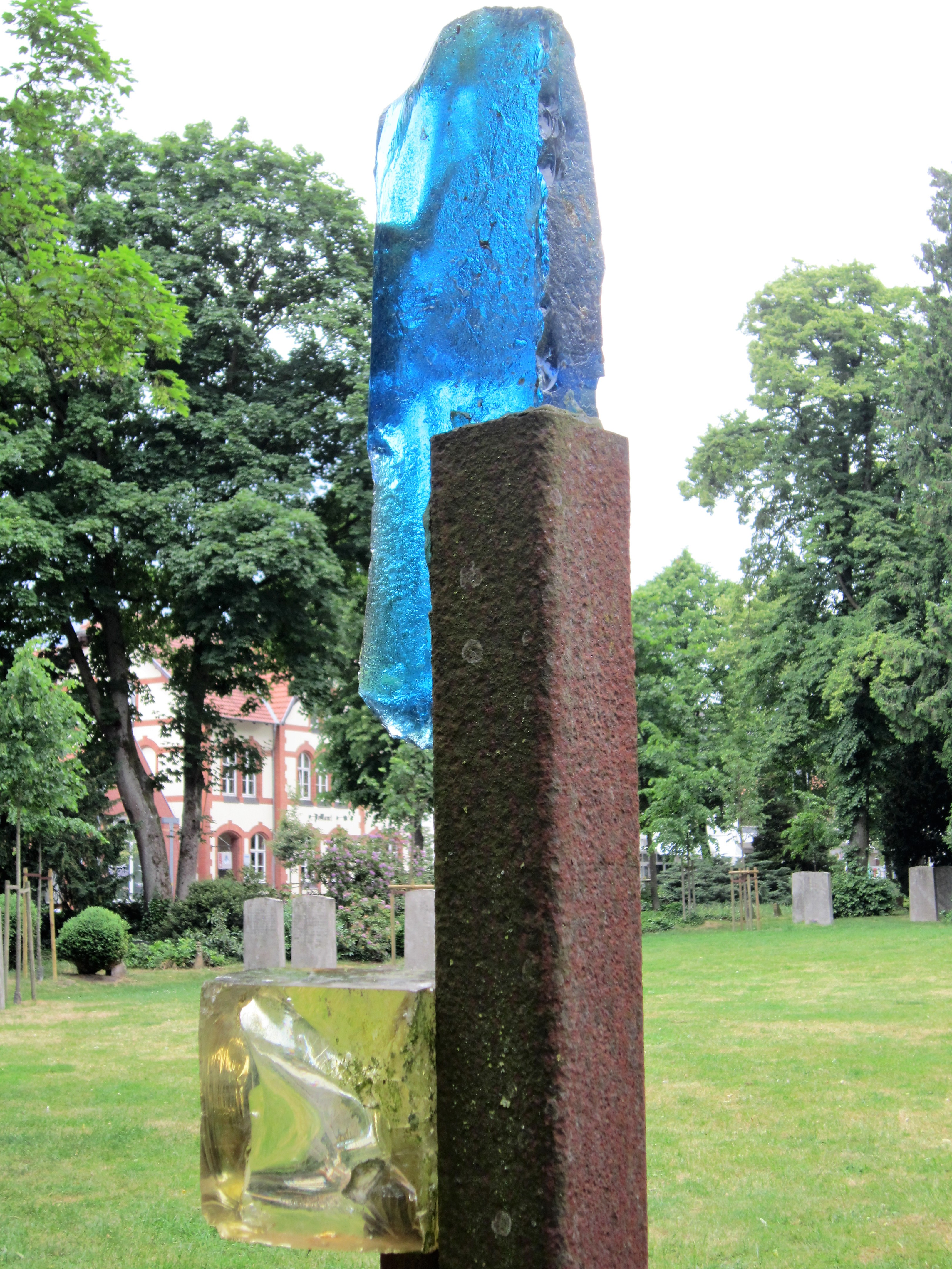 EXODUS - Skulptur in Stahl und Glas von Ulf Strippelmann (2010) im Skulpturenpark Alter Friedhof in Halle (Westfalen)